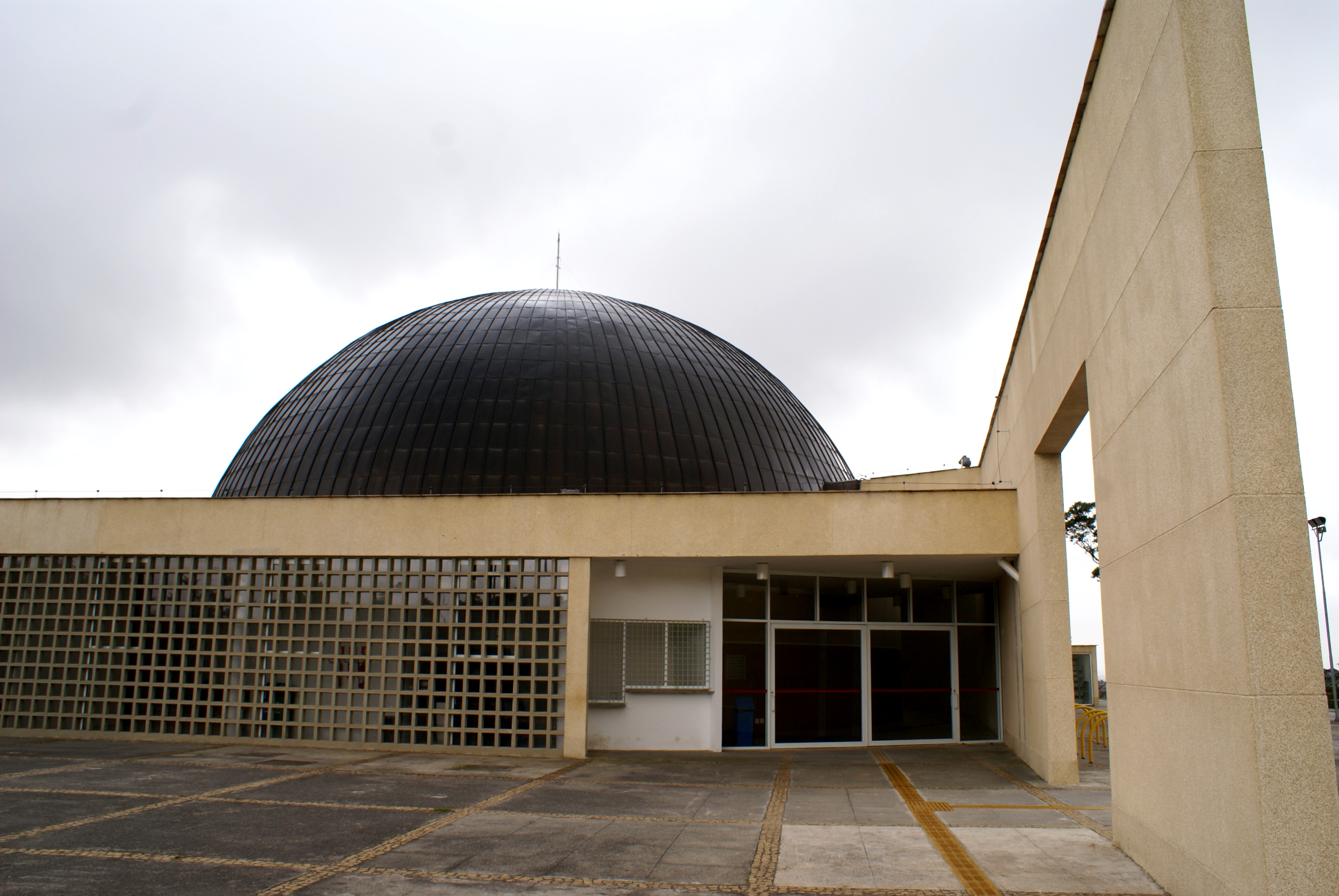 Carmo Planetarium in Carmo Park, São Paulo City, Brazil - Planetário do Carmo no Parque do Carmo, em São Paulo, Brasil.